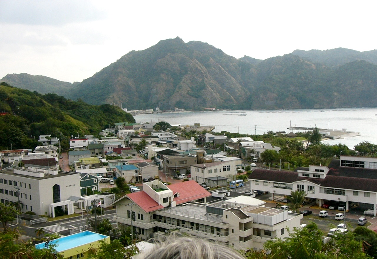 東京都小笠原村父島東町付近